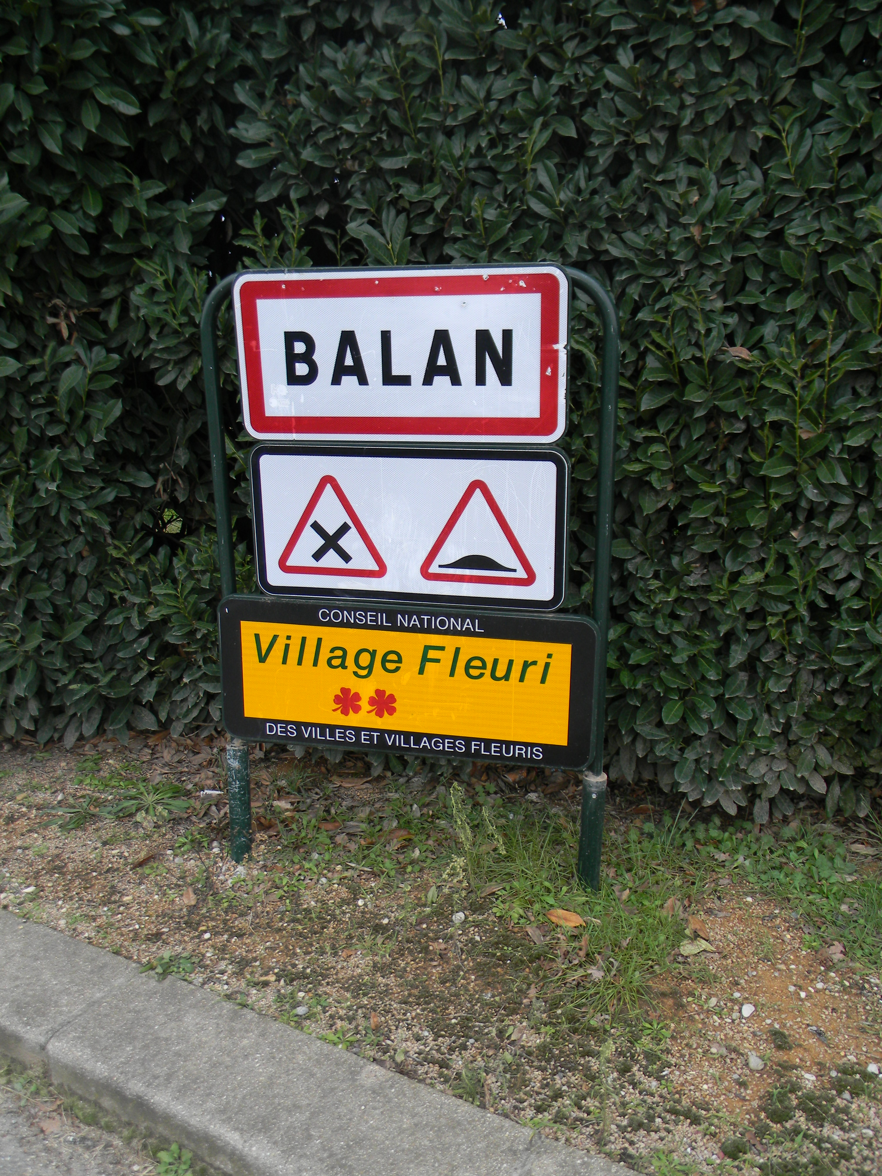 Entrée de la commune de Balan, dans l'Ain, avec deux trèfles décernés par le conseil national des villes et villages fleuris.